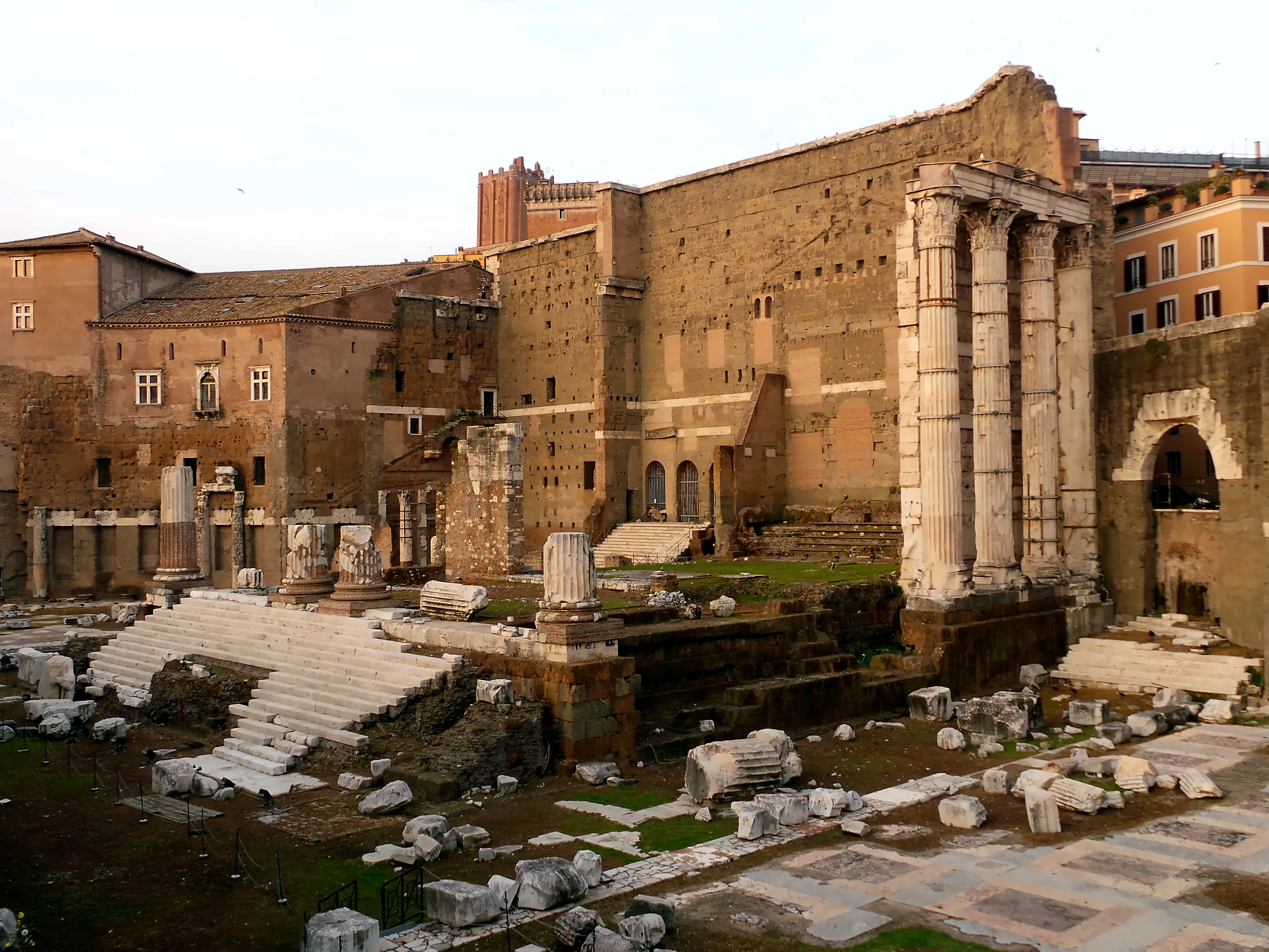 Augustusforum 2015